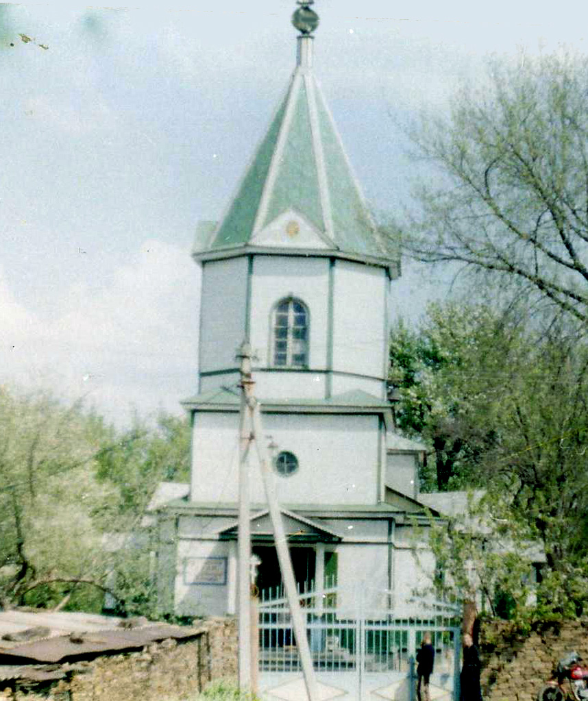 Old beliver in Gorodysche, Ukraine